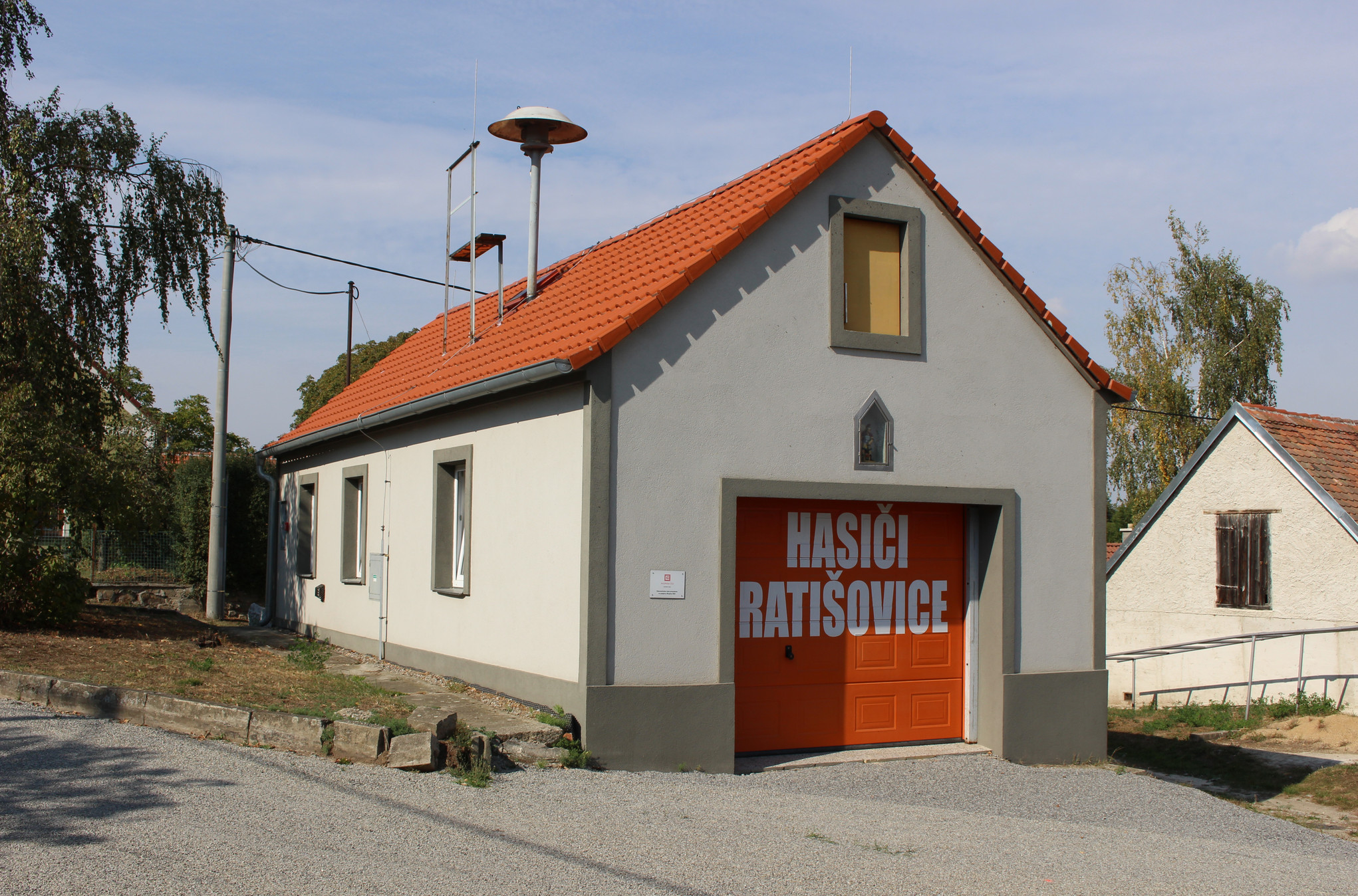 Ratišovice, místní část městyse Běhařovice, okres Znojmo, Jihomoravský kraj, hasičská zbrojnice